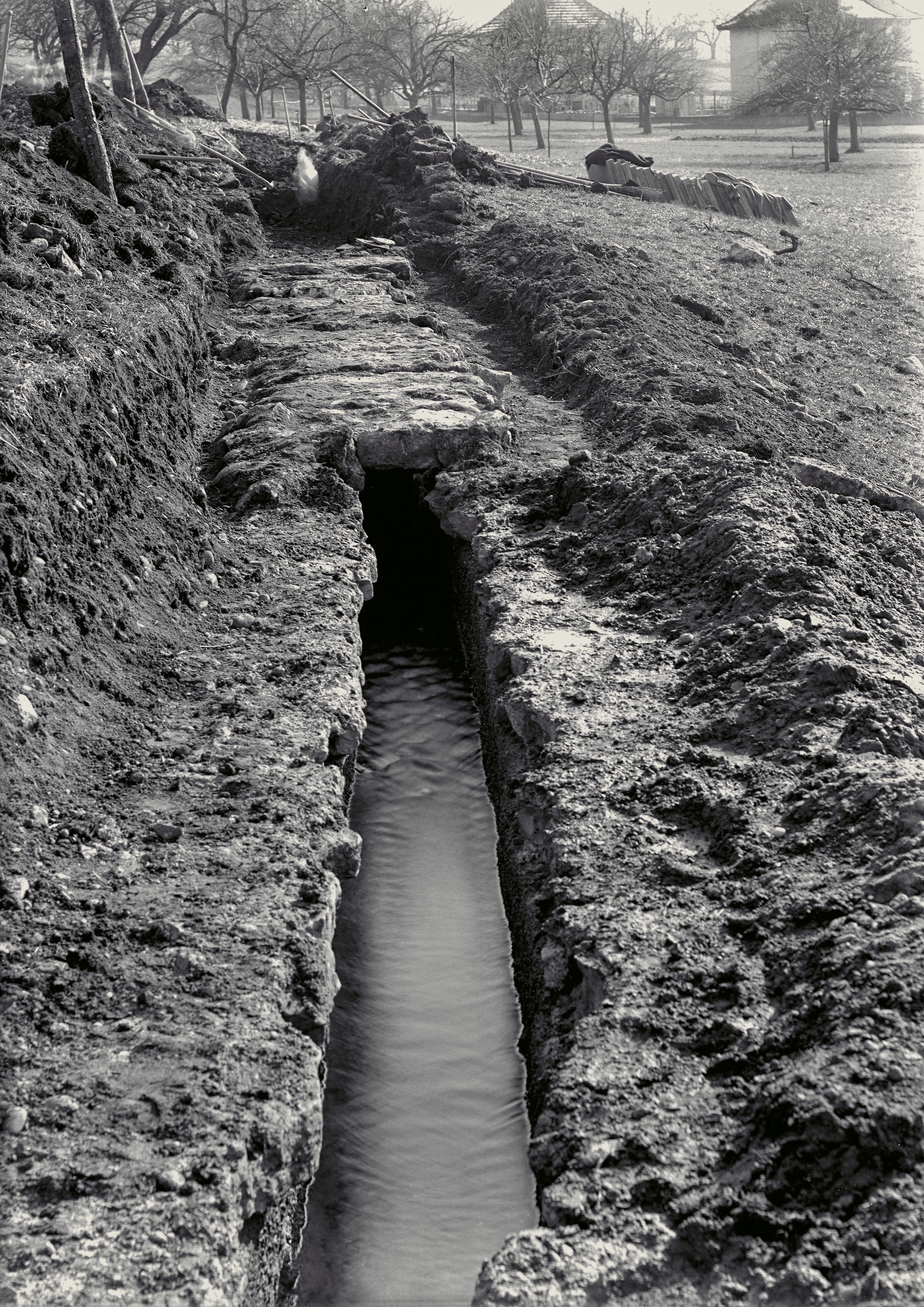 Archiv der Kantonsarchäologie Aargau Objekt: Wasserführende römische / mittelalterliche Wasserleitung von Vindonissa Ort: Windisch, Oberburg Datierung: 1. Jh. n. Chr. Aufnahmedatum: März 1935 Beschreibung: Blick von Norden auf die streckenweise abgedeckte wasserführende römische / mittelalterliche Wasserleitung in einem damals noch unbebauten Areal von Windisch-Oberburg. Im Hintergrund rechts liegen die Platten für die erneuerte Abdeckung, ganz hinten rechts die Häuser Beerliweg 3 und 5.